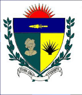 Escudo de Armas del Municipio de Tekantó, Yucatán